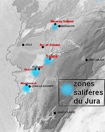 Carte des Sites saliféres du massif du Jura français (sel gemme)